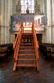 Versuchsaufbau zur Perspektive - Leonardos Abendmahl- in der Wiener Minoritenkirche 2006